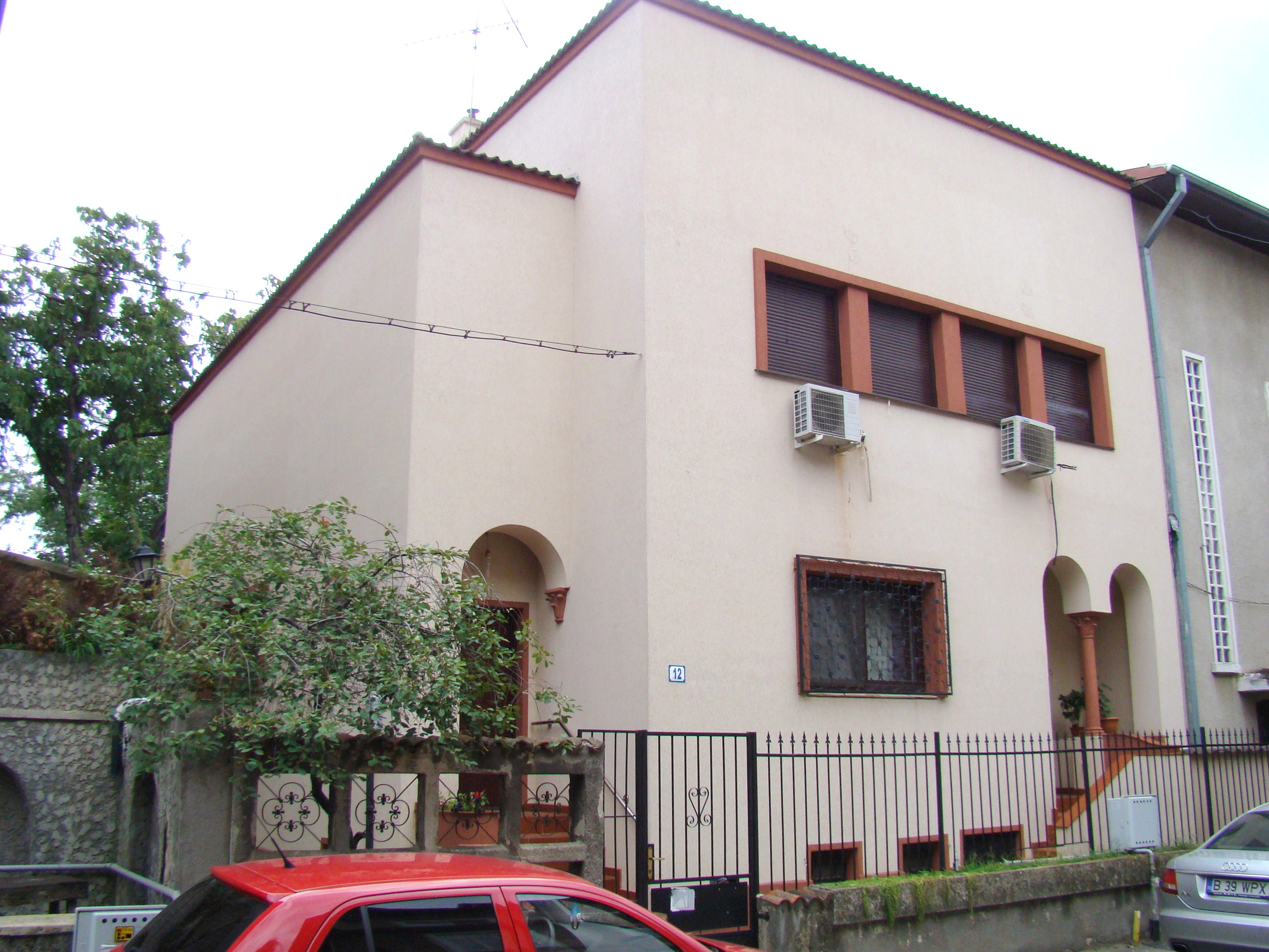 Clădire monument istoric, str. Tokio, nr.12